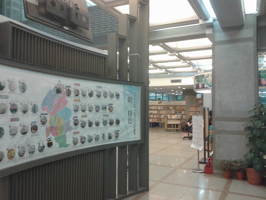 臺北市立圖書館總館大廳。